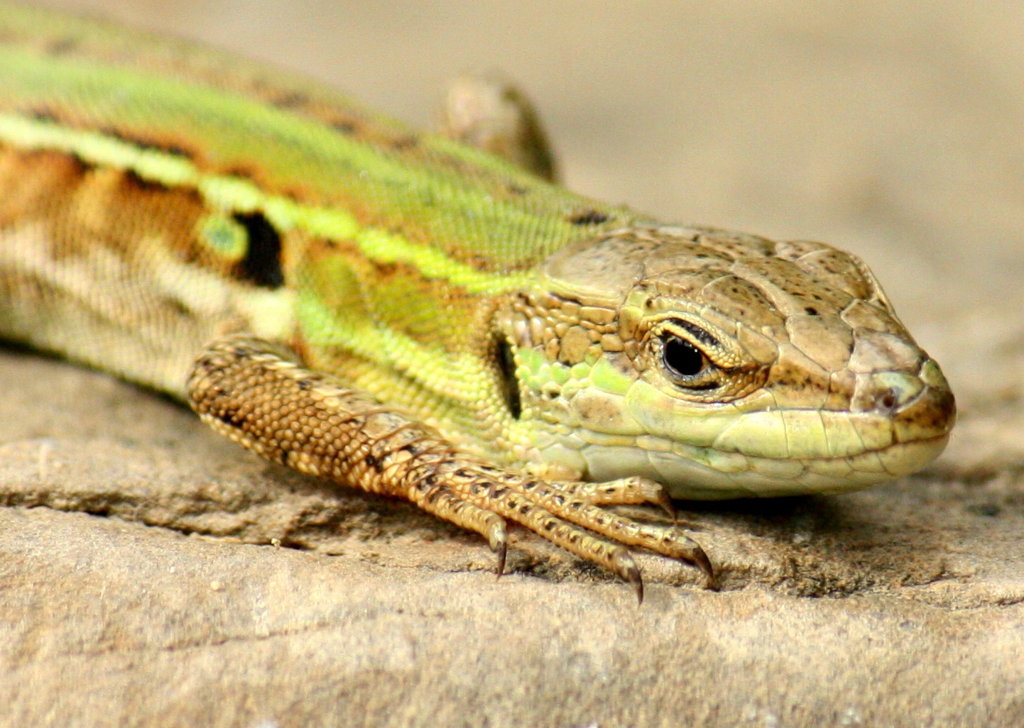 Eidechse in Florenz